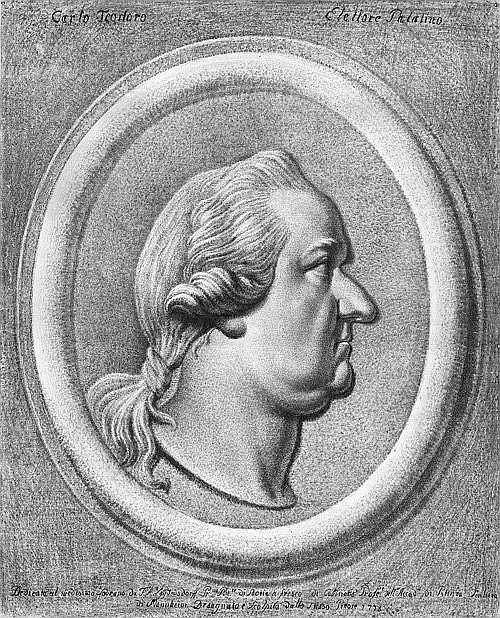 Franz Anton Leitenstorffer (1721-1795), Radierung, Kurfürst Karl Theodor (Pfalz-Bayern)